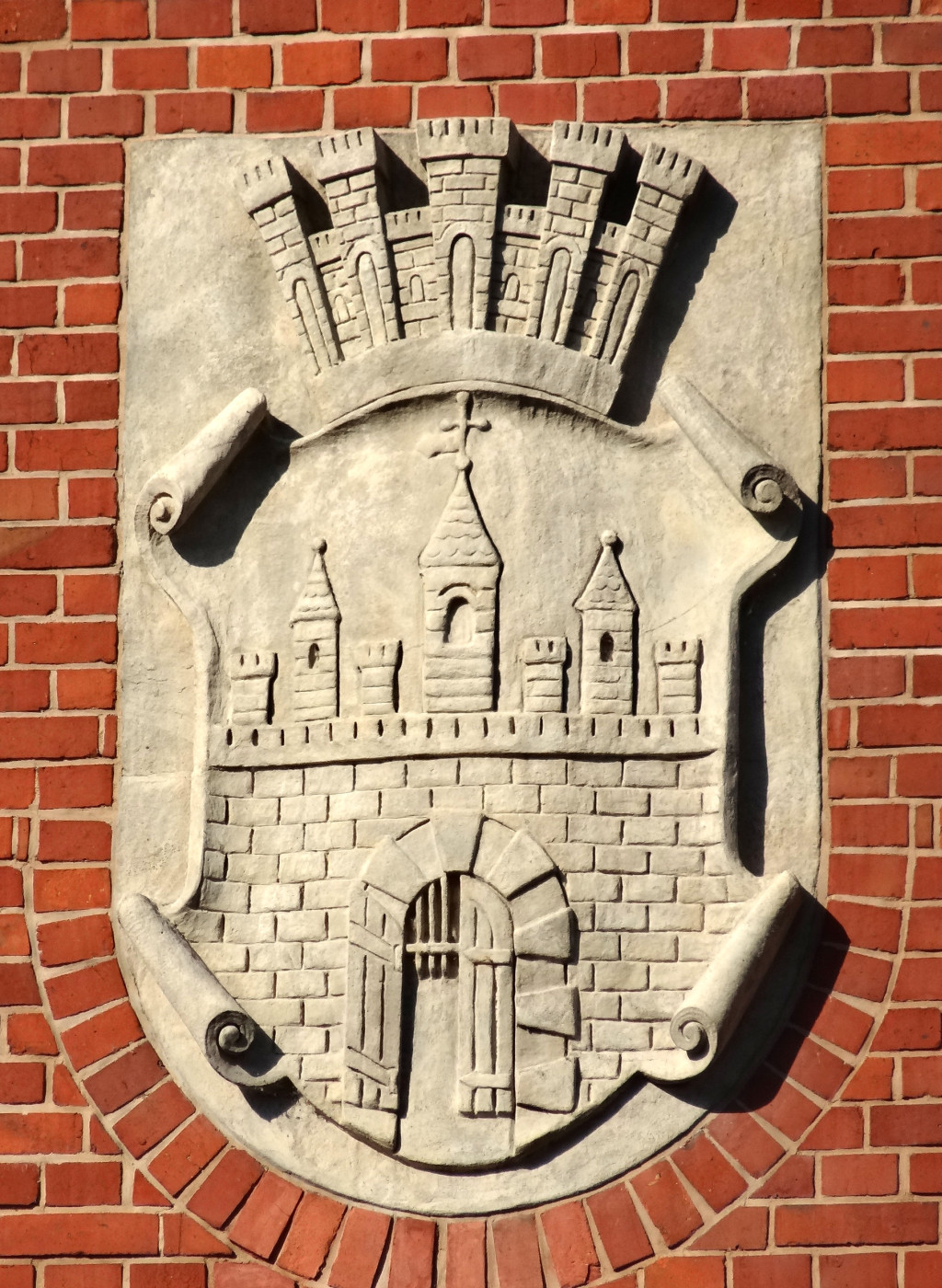 Miejska hala targowa w Bydgoszczy przy ul. Podwale zbud. 1906 r